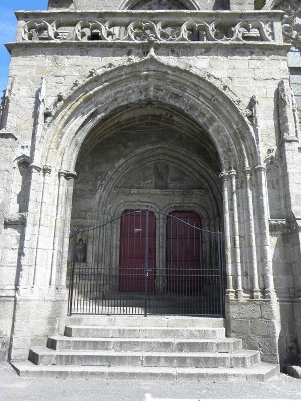 Porche méridional de la chapelle N.D. du Kreisker à Saint-Pol-de-Léon (29).